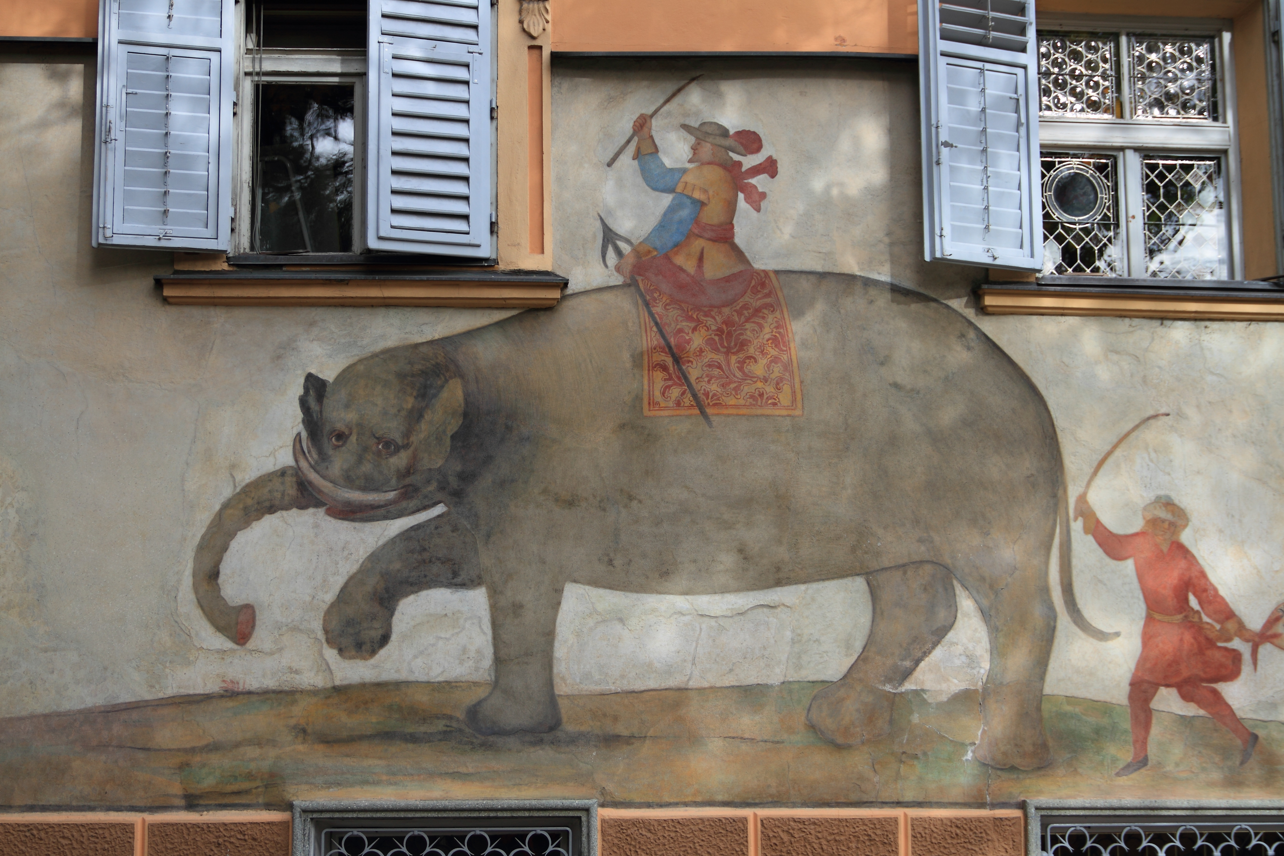 Fassadenmalerei am Hotel Elefant in Brixen.